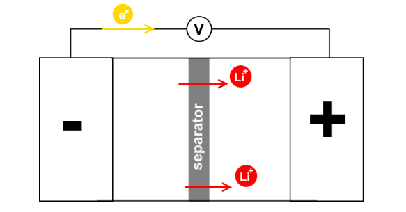 Opbouw van de Lithium-ion-accu. De elektronen stromen van de anode (-) naar de kathode (+). Tussen de anode en kathode zit een separator.